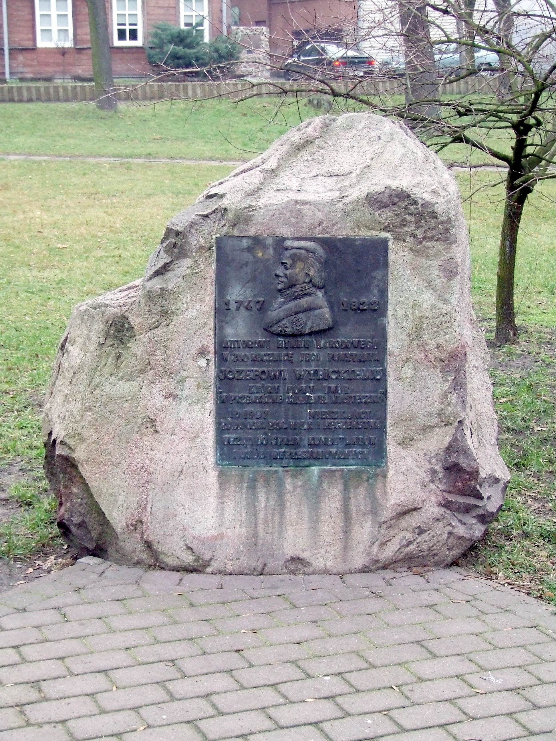 Nowy Dwór Mazowiecki, obelisk ku czci Józefa Wybickiego